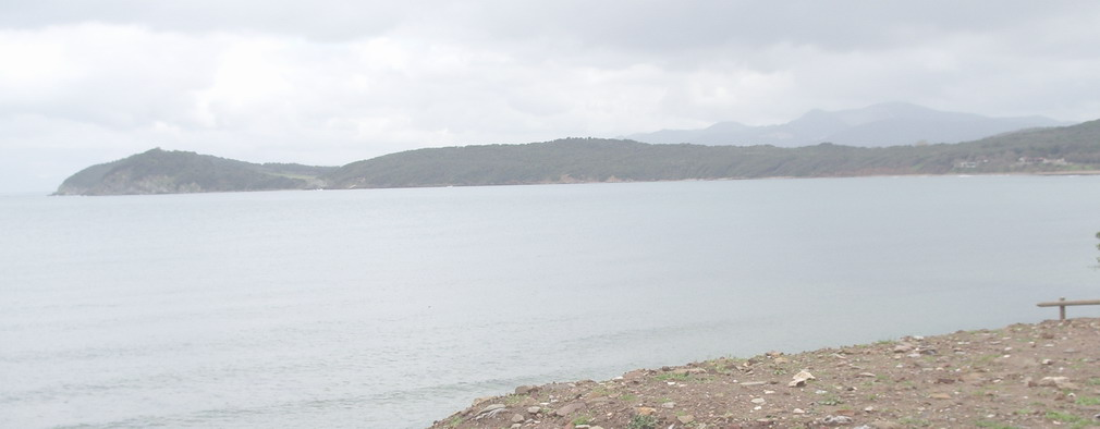 Il promontorio di Poggio San Leonardo nel comune di Piombino visto dal porto di Baratti